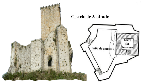 Castelo de Andrade na Pena Laboreira (Pontedeume)